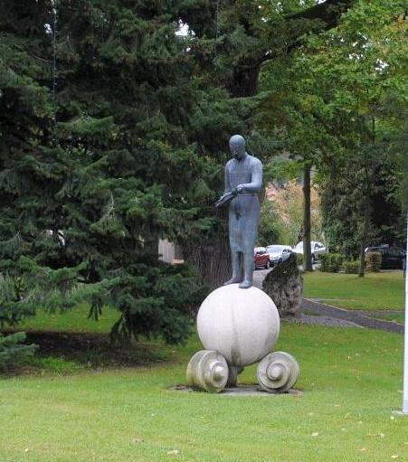 Geigenbaudenkmal in Bubenreuth